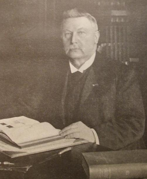 Professor Dr Jan Poels, stichter en directeur van de Rijksseruminrichting te Rotterdam,File 1921